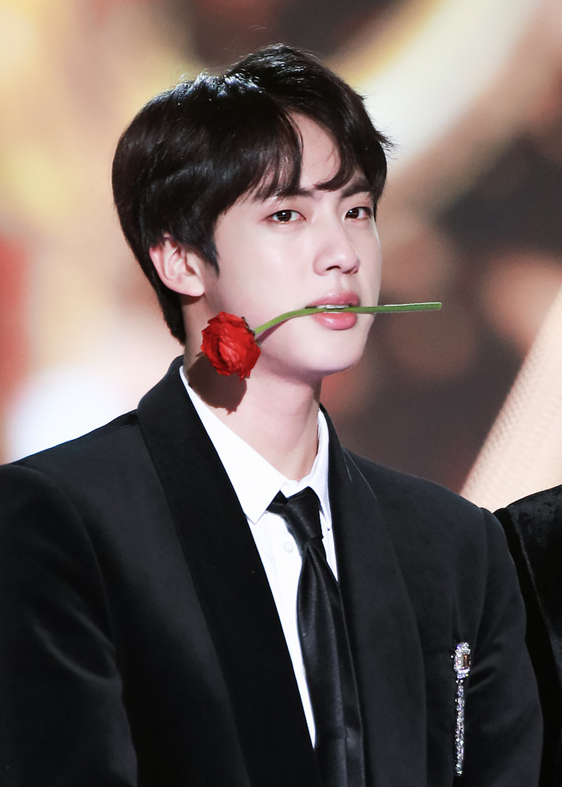 180125 방탄소년단 진